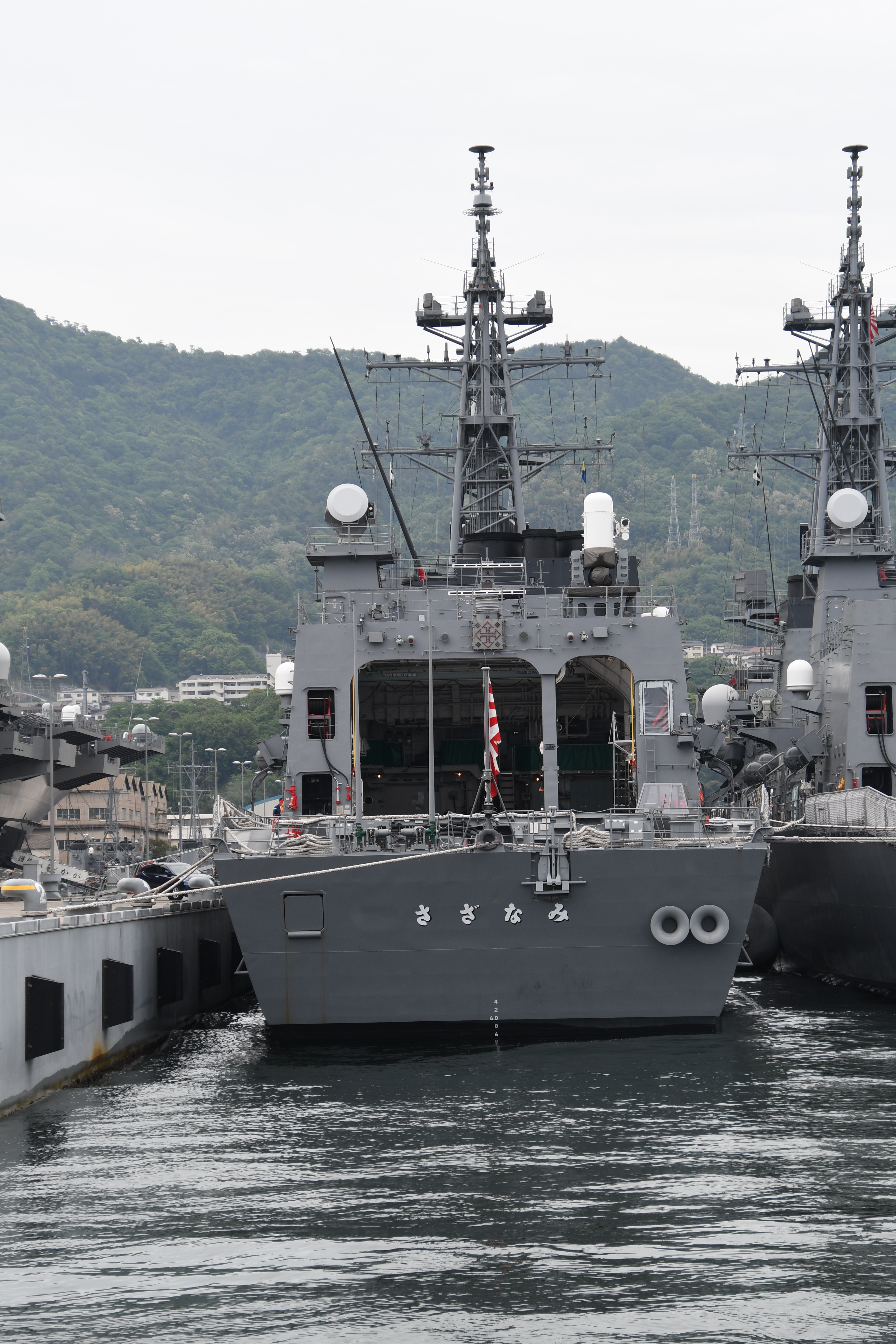 海上自衛隊 護衛艦さざなみ（DD-113） 後面。2018年5月6日 呉基地にて。